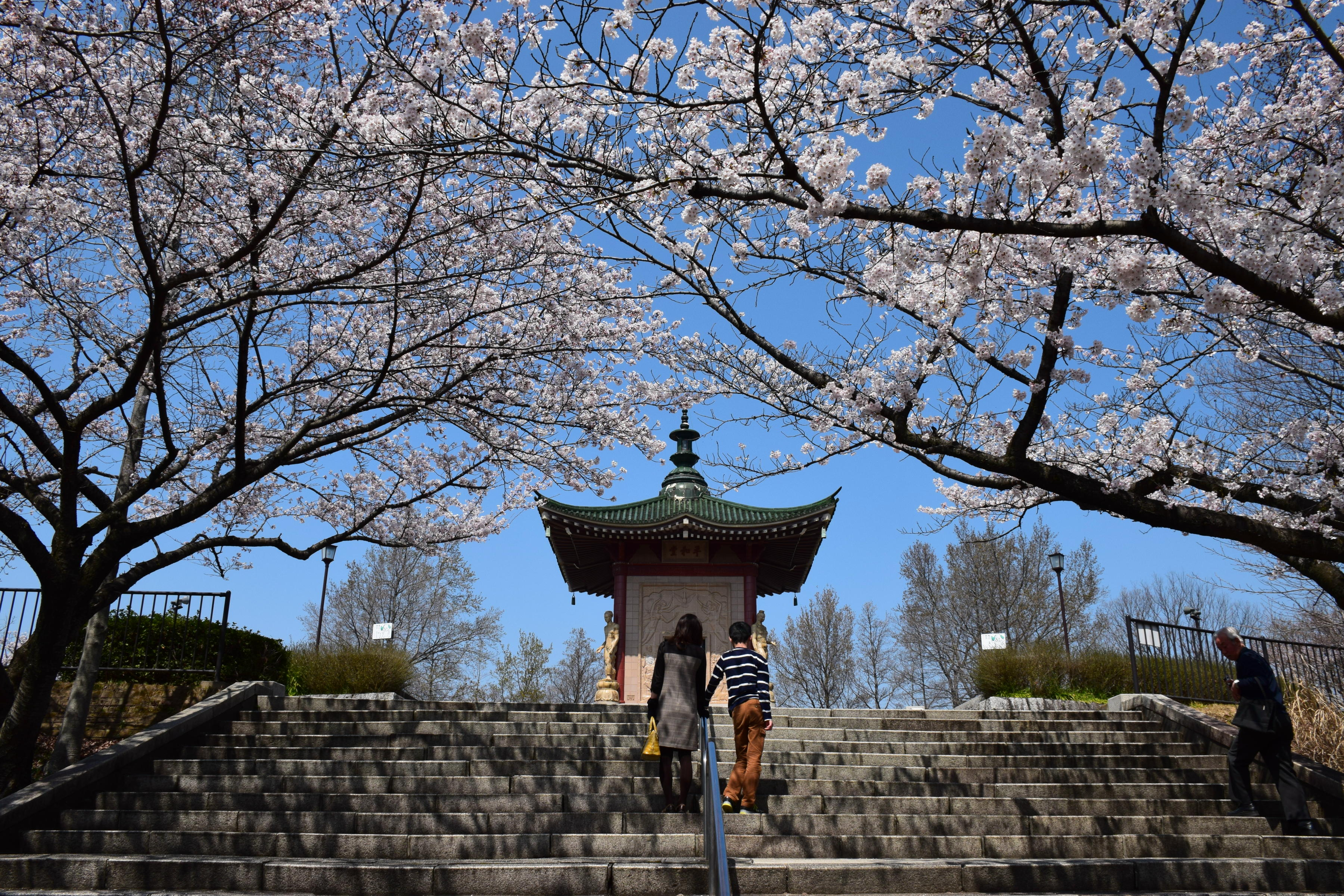 平和公園の桜